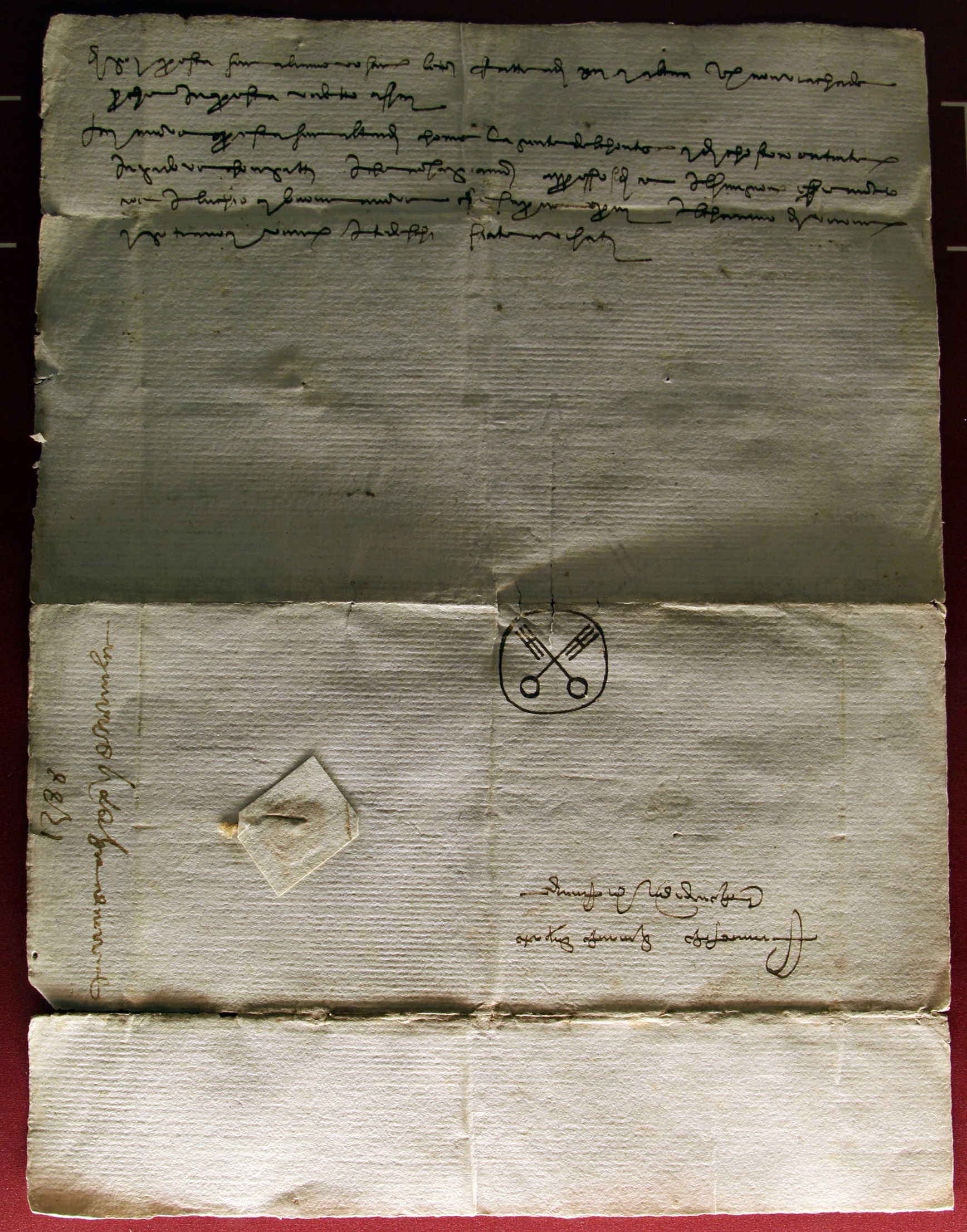 Palazzo Datini - Prato